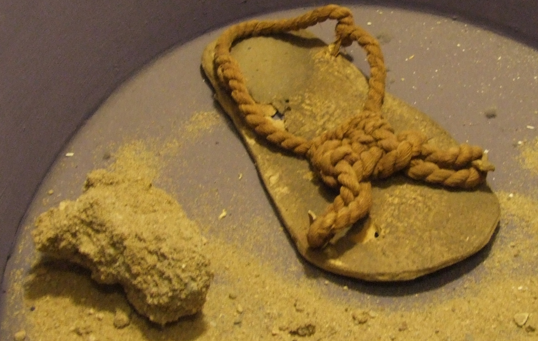 Sandale aus der Inkazeit, 15. Jhd., Küste von Süd-Peru, gut erhalten durch die trockene salpeterhaltige Luft. Aufbewahrt im Deutschen Schumuseum Hauenstein